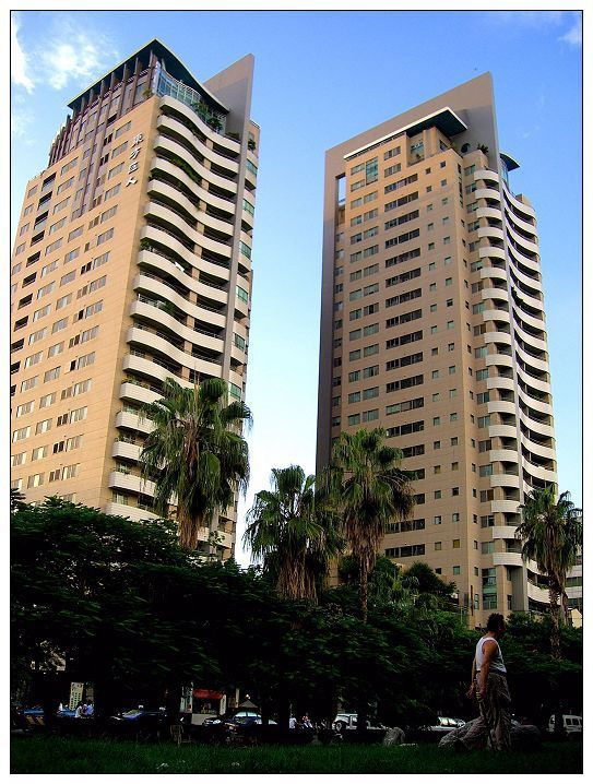 臺灣臺南市東方巨人大廈